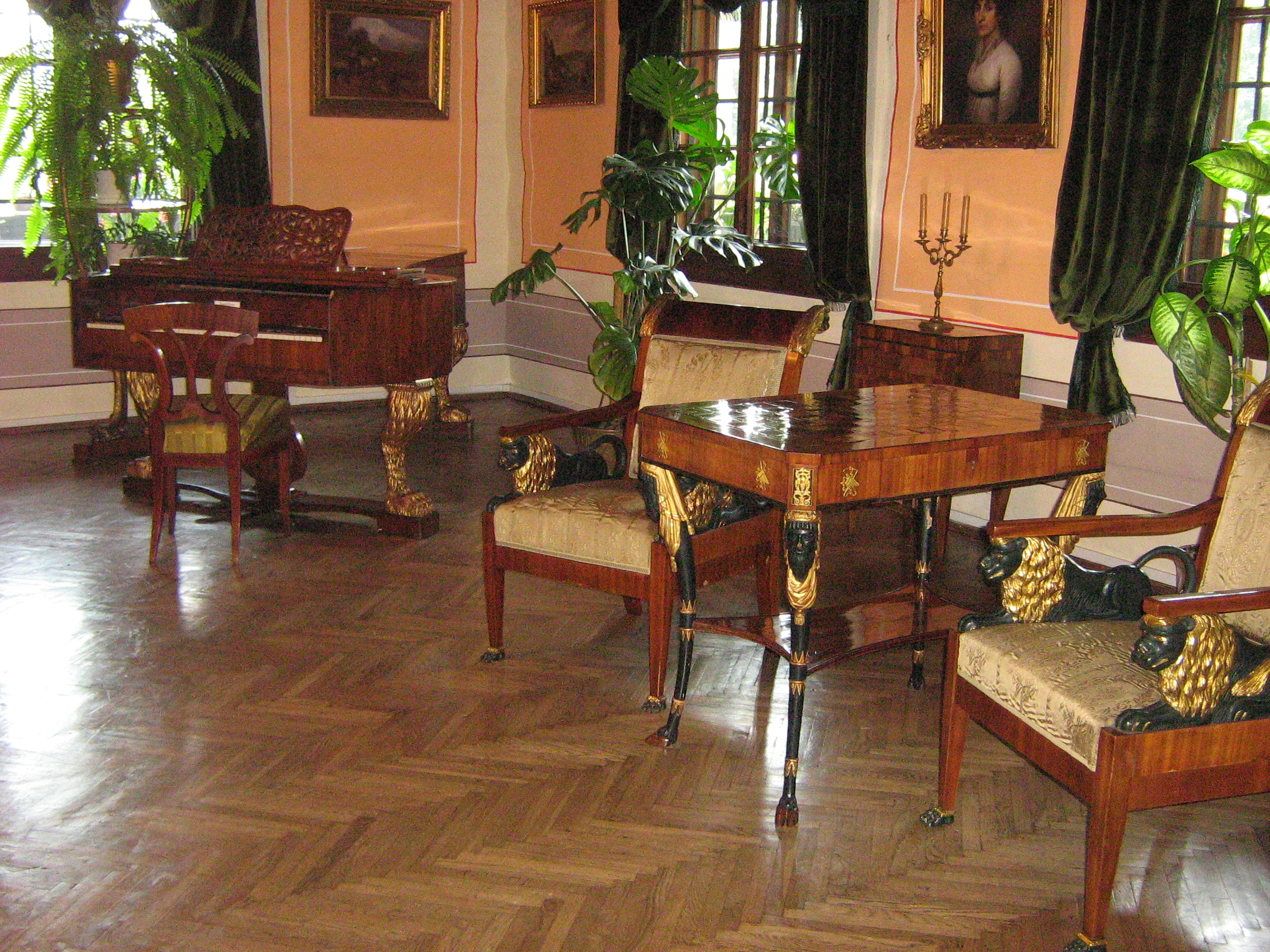 Dwór w Stryszowie. Wnętrze